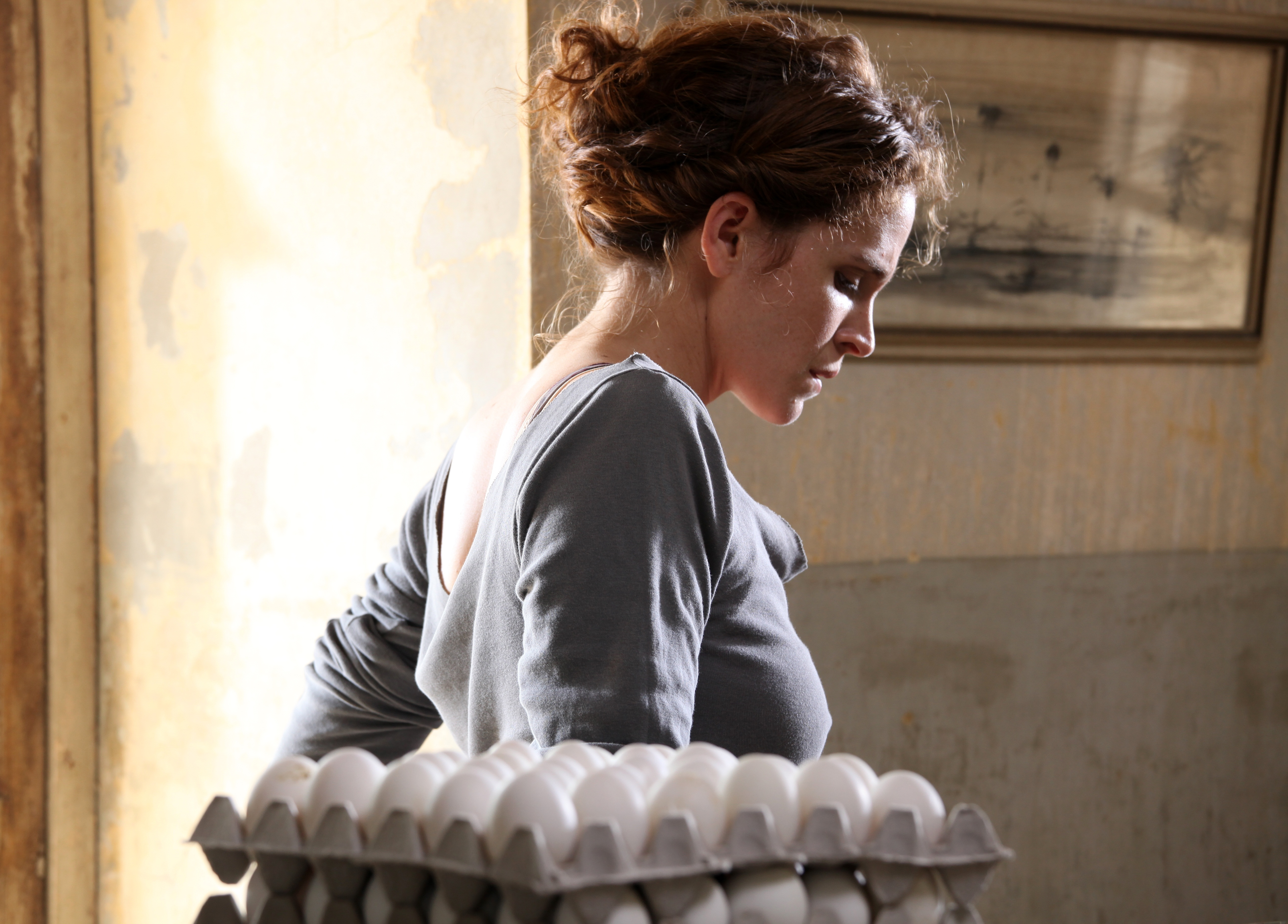 הגר בן-אשר בסרטה "הנותנת", 2011